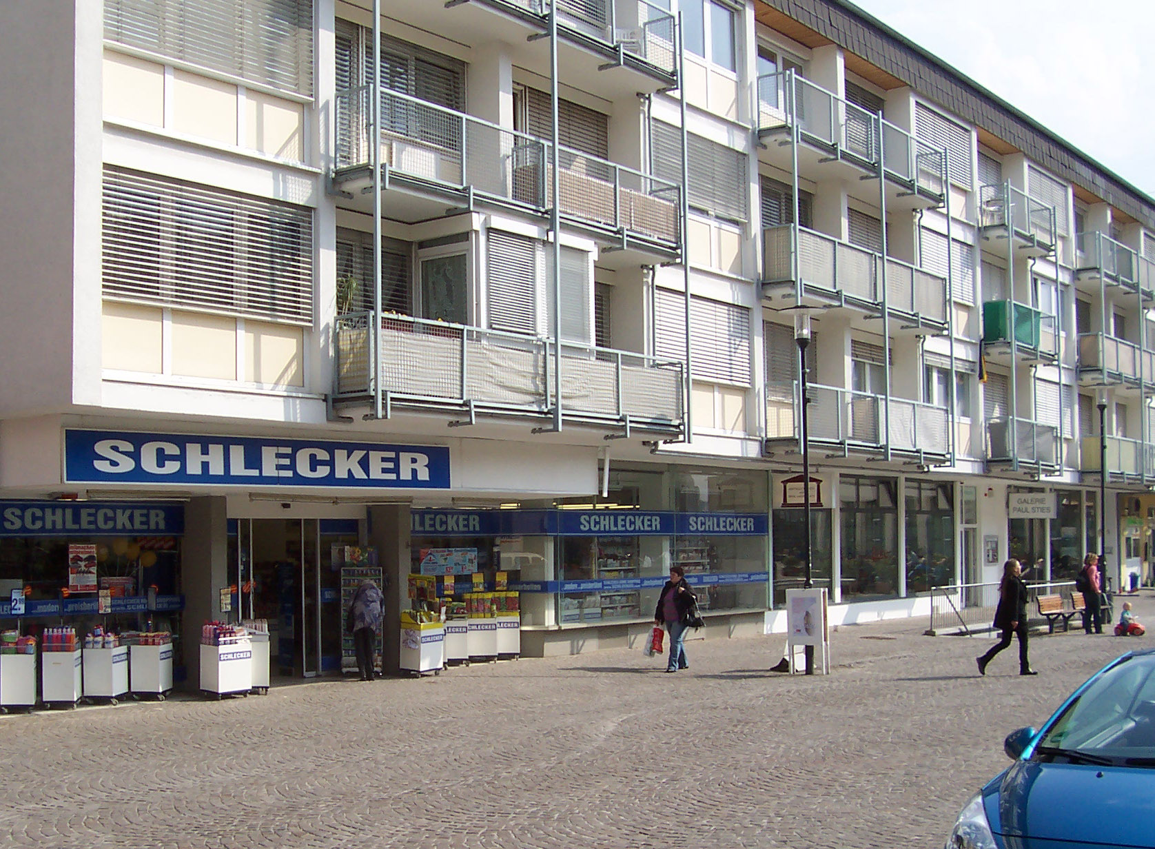 Typische deutsche Schlecker-Filiale in Kronberg/Taunus